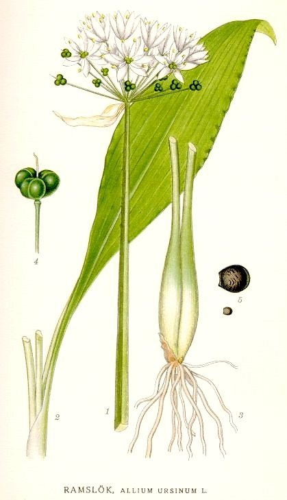 Allium ursinum L. Original Description Ramslök, Allium ursinum L.